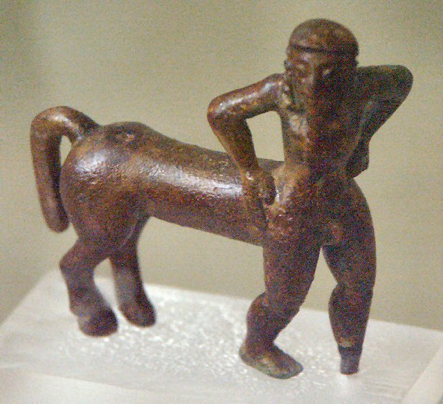 Miniatur eines Kentauren aus Kreta